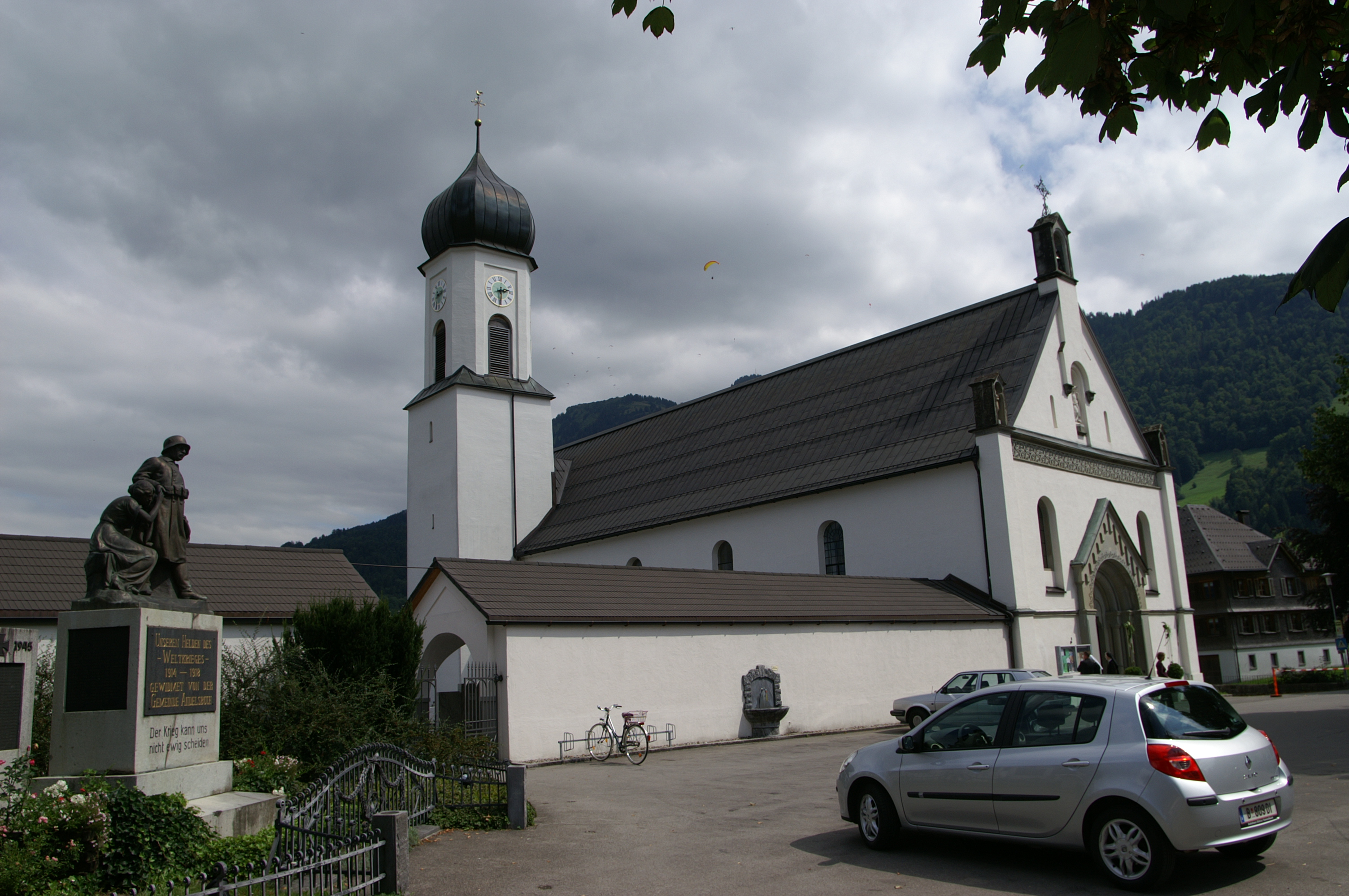 Hl. Petrus&Paulus Pfarrkirche der Gemeinde Andelsbuch